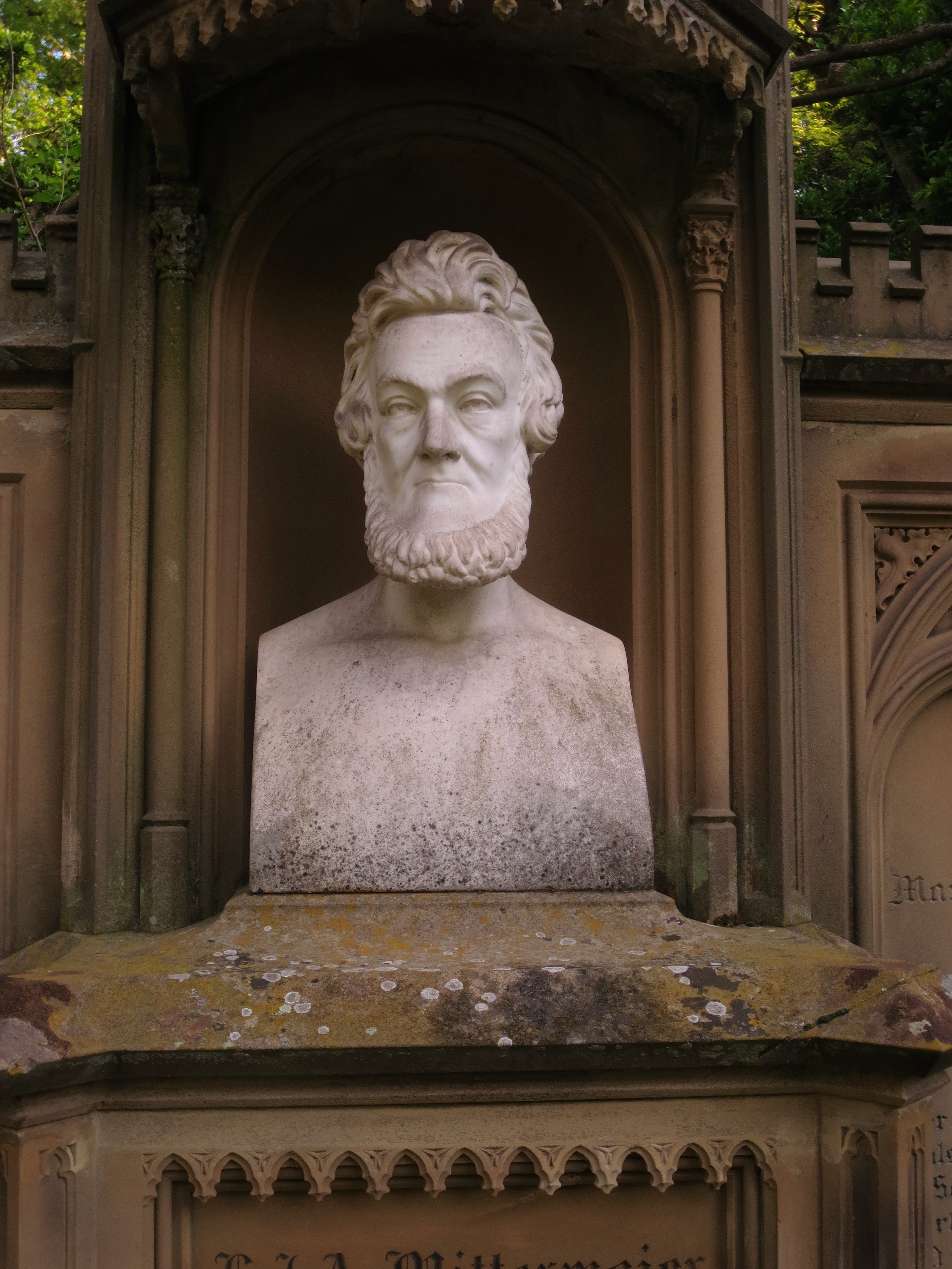 Carl Joseph Anton Mittermaier, Marmor Büste auf dem Familiengrab, Bergfriedhof Heidelberg